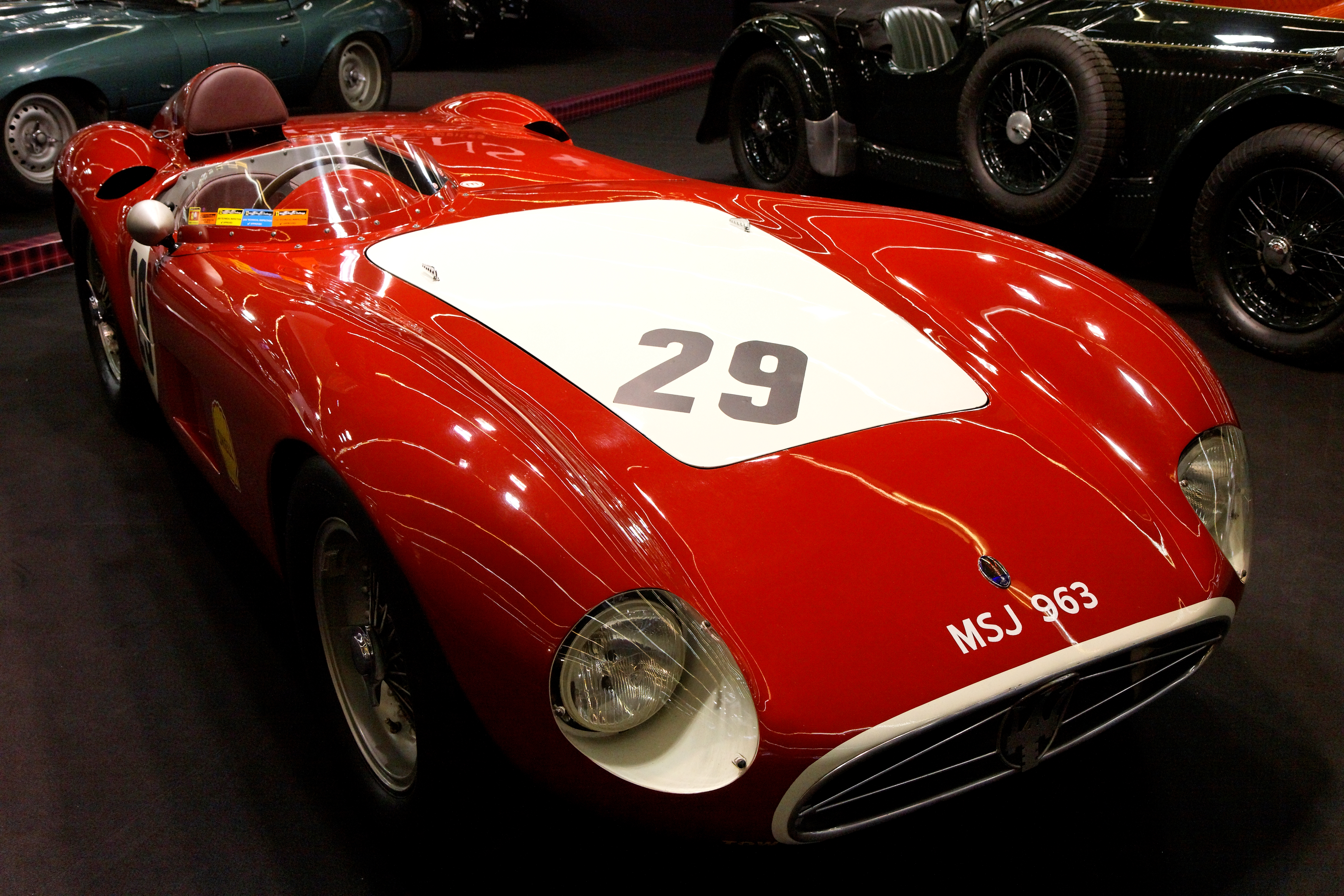 Photographie prise lors du salon rétromobile 2011 à Paris, porte de Versailles.